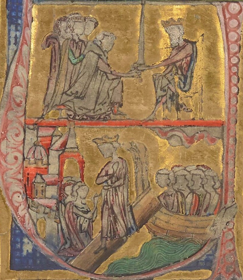 Adîd abû Muhammad et Shîrkûh, Arrivée d'Amaury Ier à Constantinople